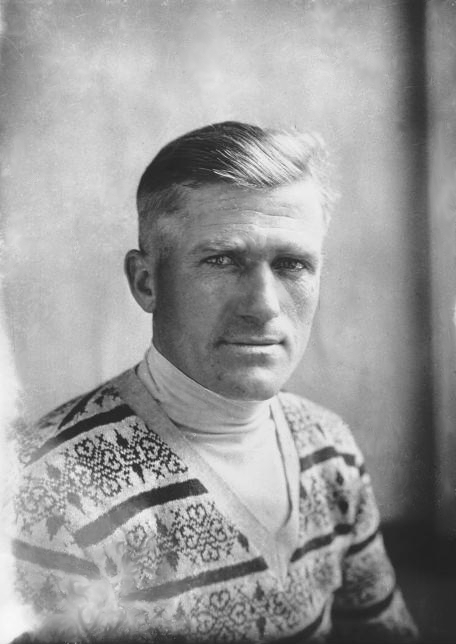 Maurice De Waele lors du Tour de France 1929